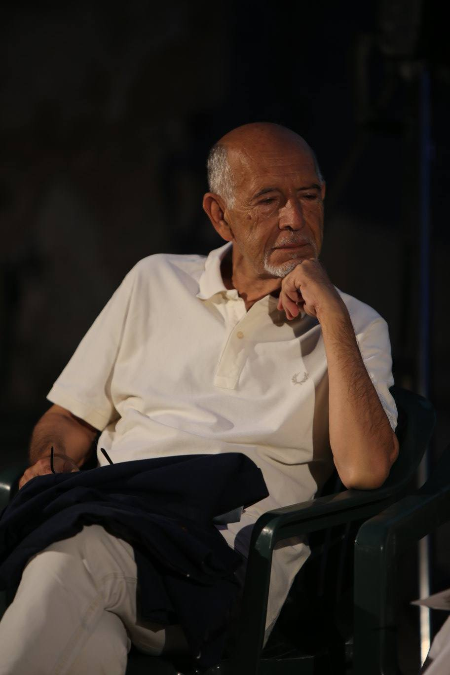 Storico del cinema